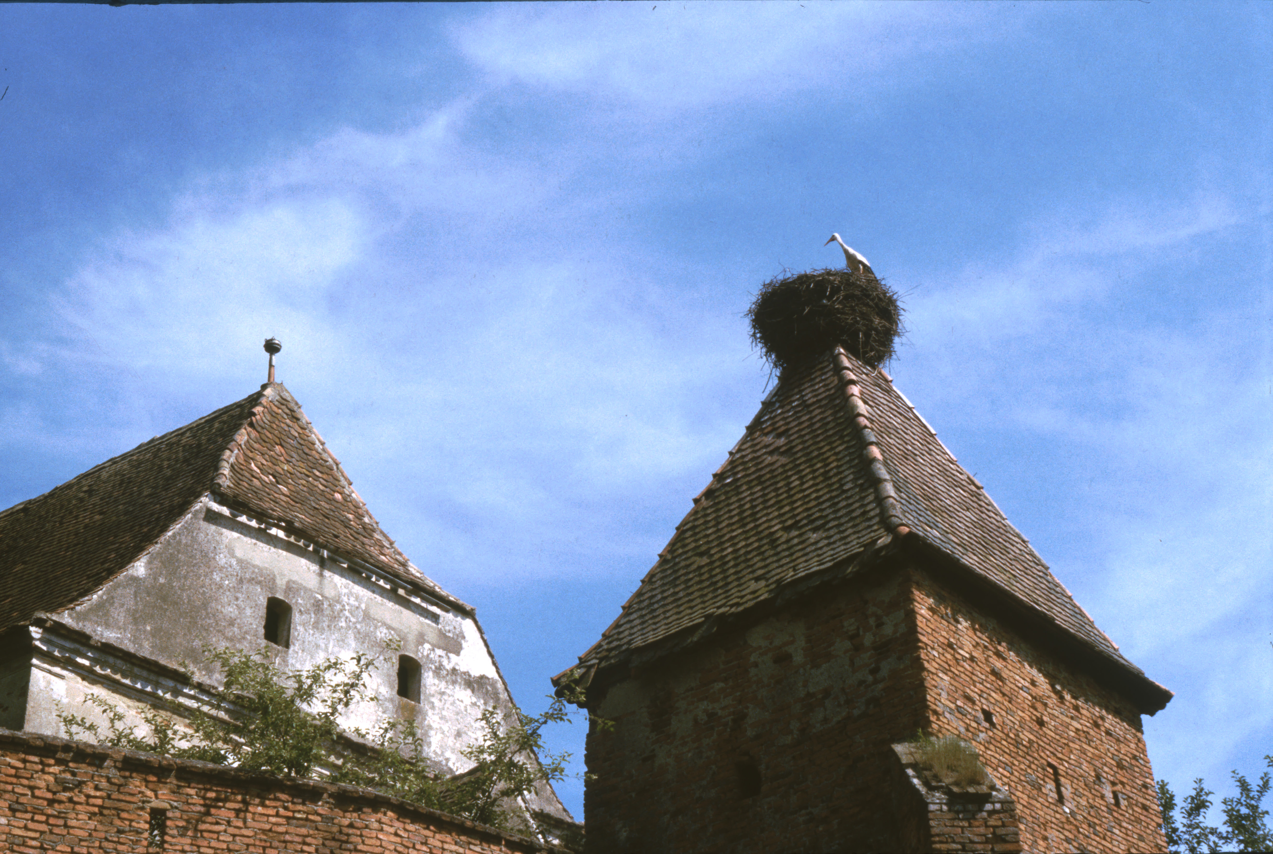 Kirchenburg Almen (Alma-Vii, Romania), Westturm mit Storchennest